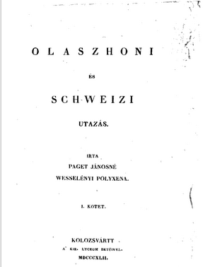 Olaszhoni es Schweizi utazas, 1842, John Paget, Polyxenia Wesselenyi